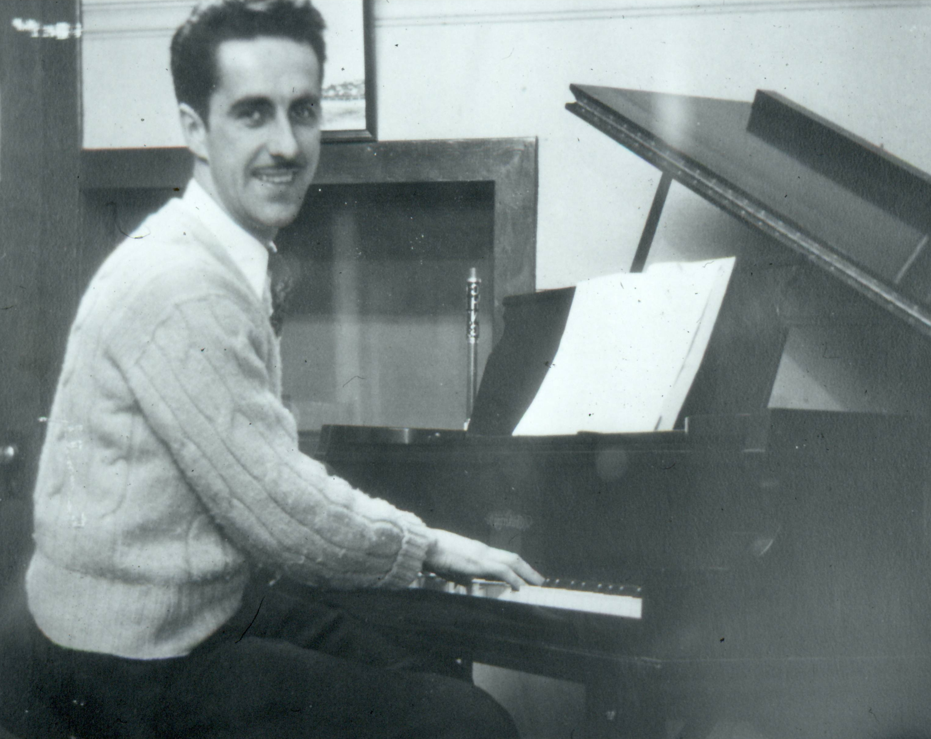 Jean Boileau au piano début des années 40